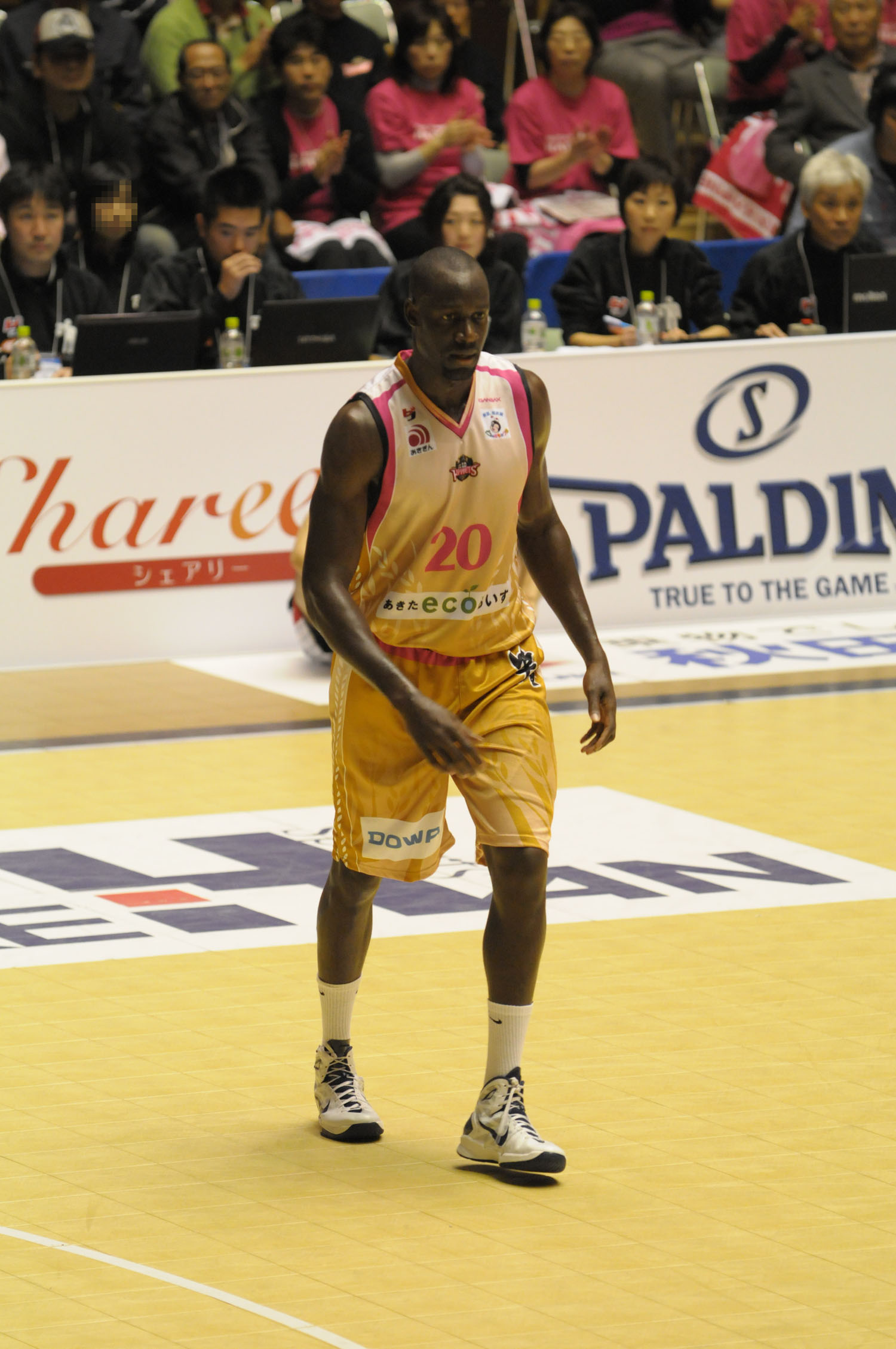 秋田ノーザンハピネッツ、スタンリー・オシティ選手。秋田県立体育館で。